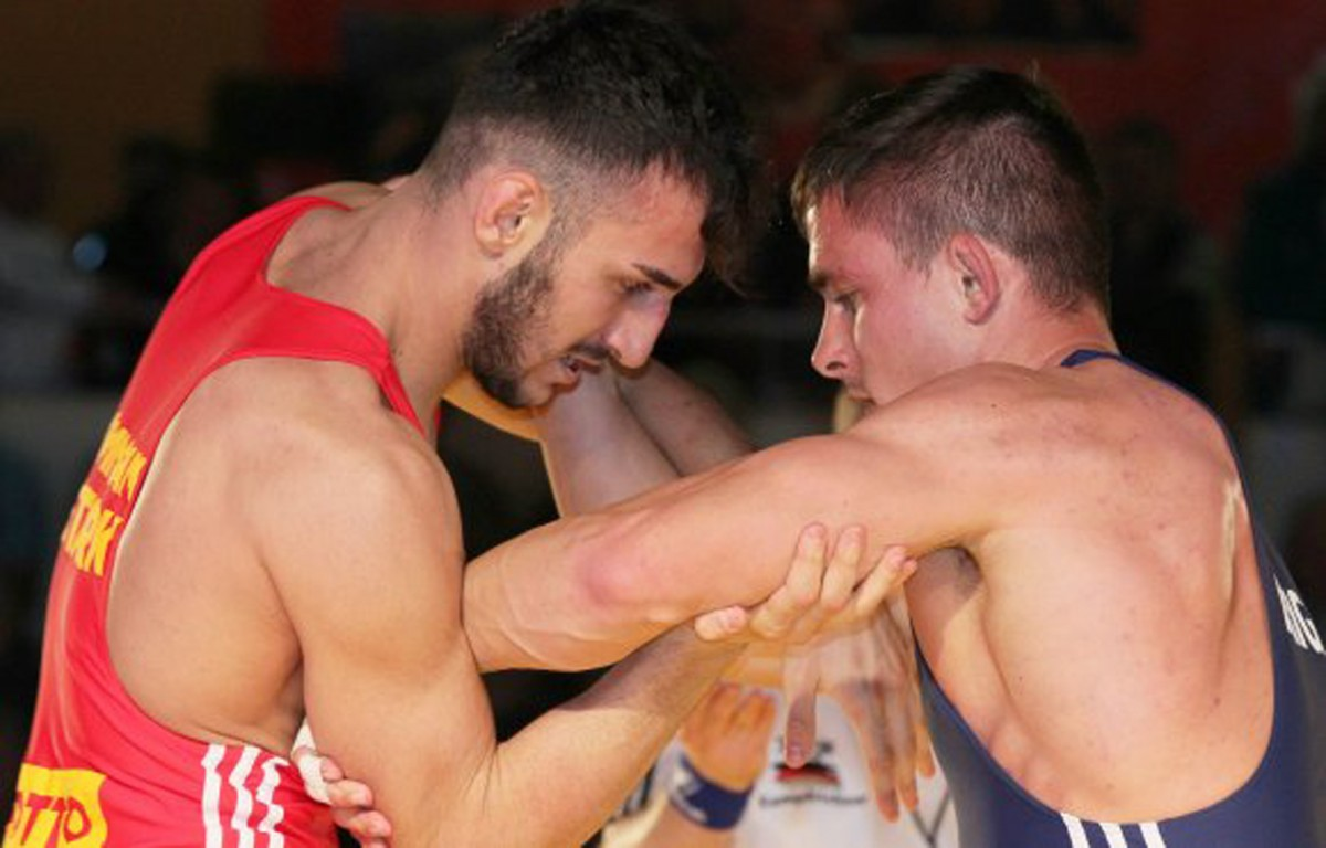 Im Bundesliga Kampf gegen Mömbris Königshofen